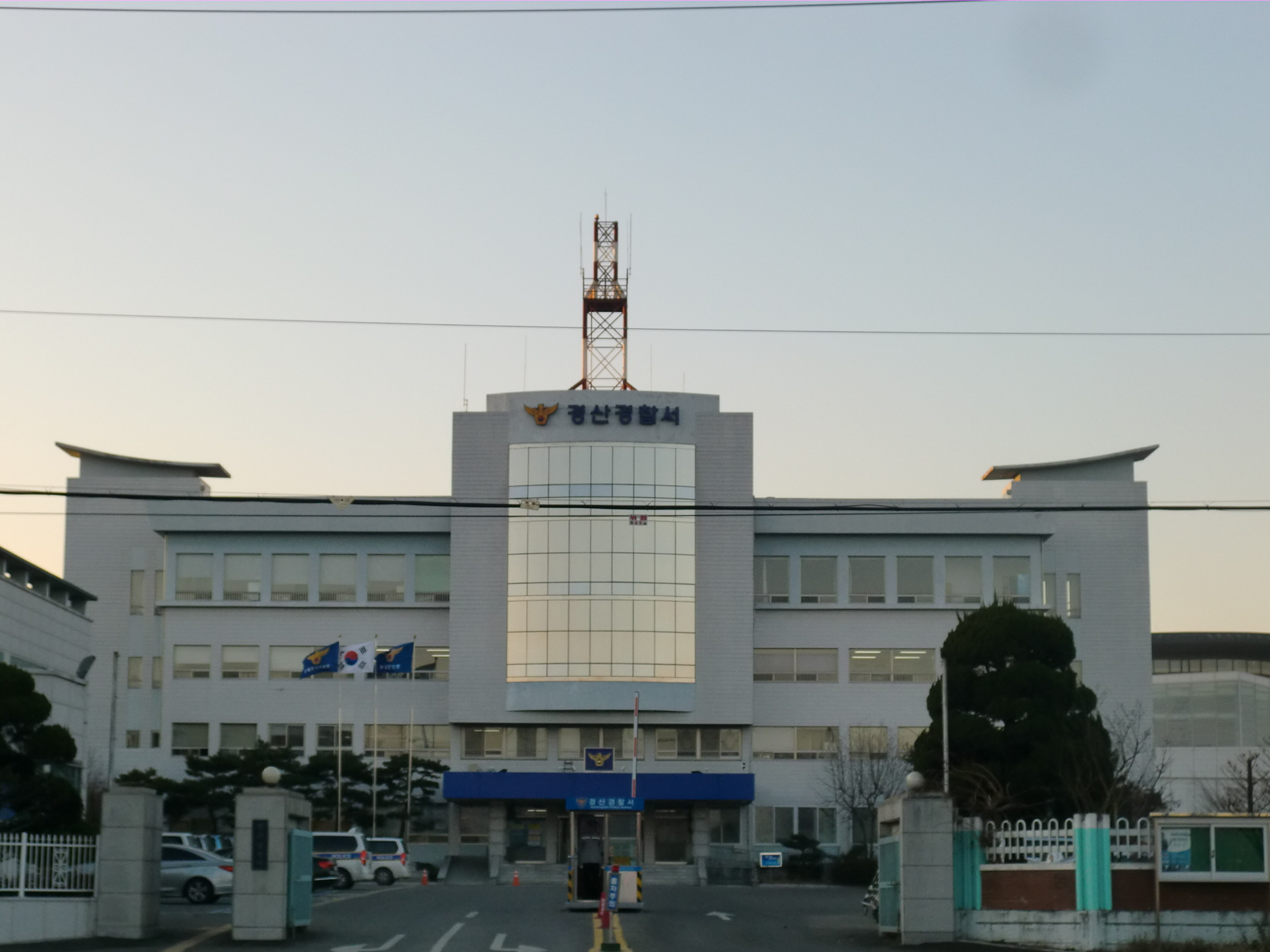 경상북도 경산시에 있는 경산경찰서